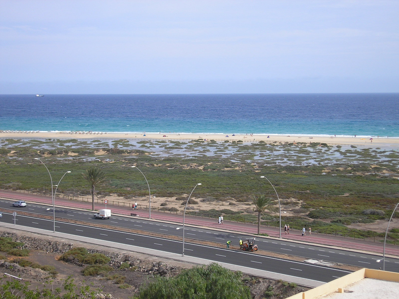 Die Salzwiesen am Strand von Jandia bei Morro Jable auf Pájara, Fuerteventura.